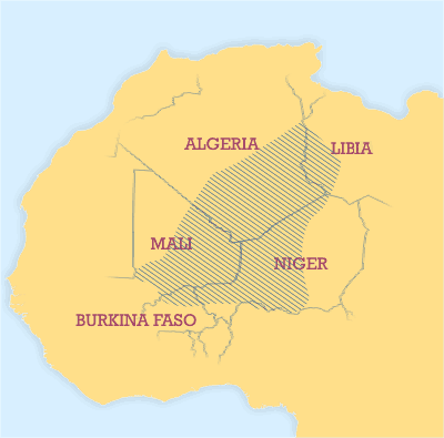 Areas where significant numbers of Tuaregs live. *Basset (1952) *Bernus (1996) Touaregs: un peuple du désert. *Lhote (1984) *Sudlow (2001) *Bougchiche, Lamara. (1997) Langues et litteratures berberes des origines a nos jours. Bibliographie internationale et sytematique. Paris: Ibis Press. *Zavadovskij (1967)